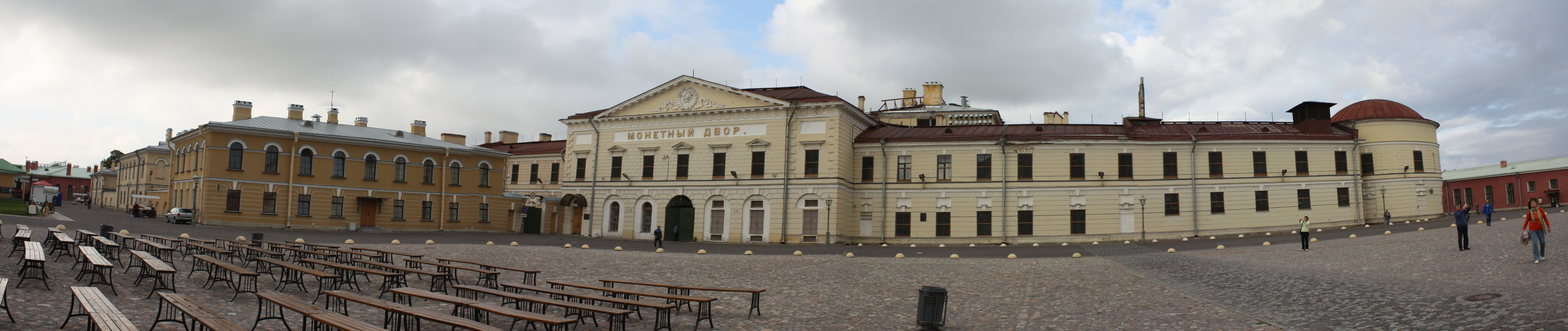 Peter und Paul Kathedrale Sankt Petersburg 2009 Touristenbilder